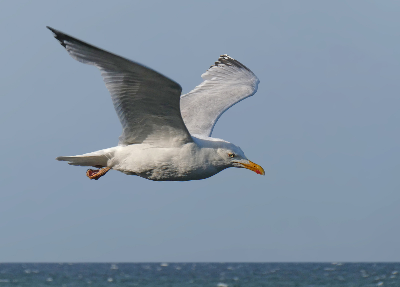 En vuxen gråtrut flyger förbi.